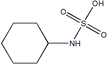 Struktur: Tor Svensson